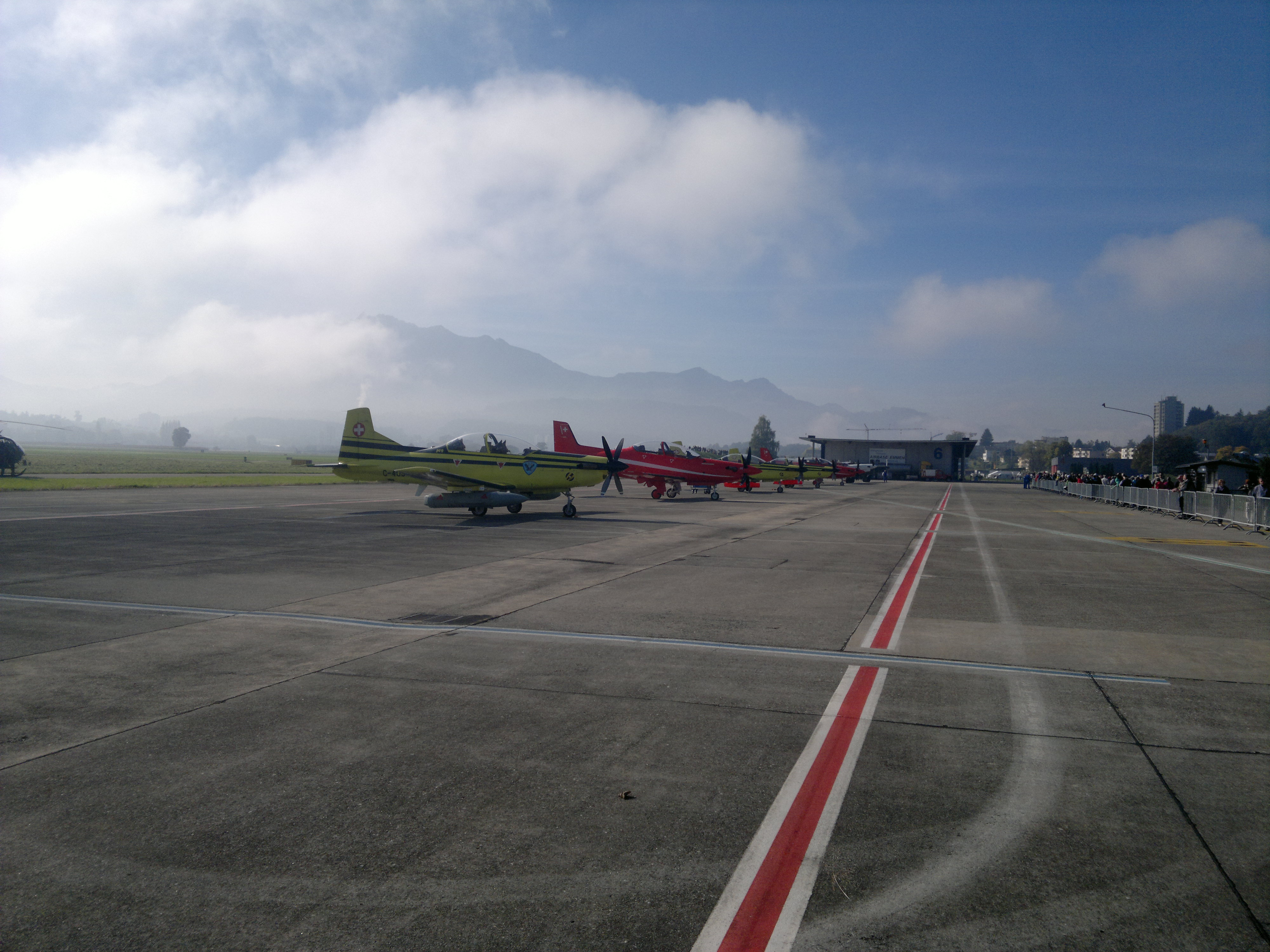 Line up Emmen